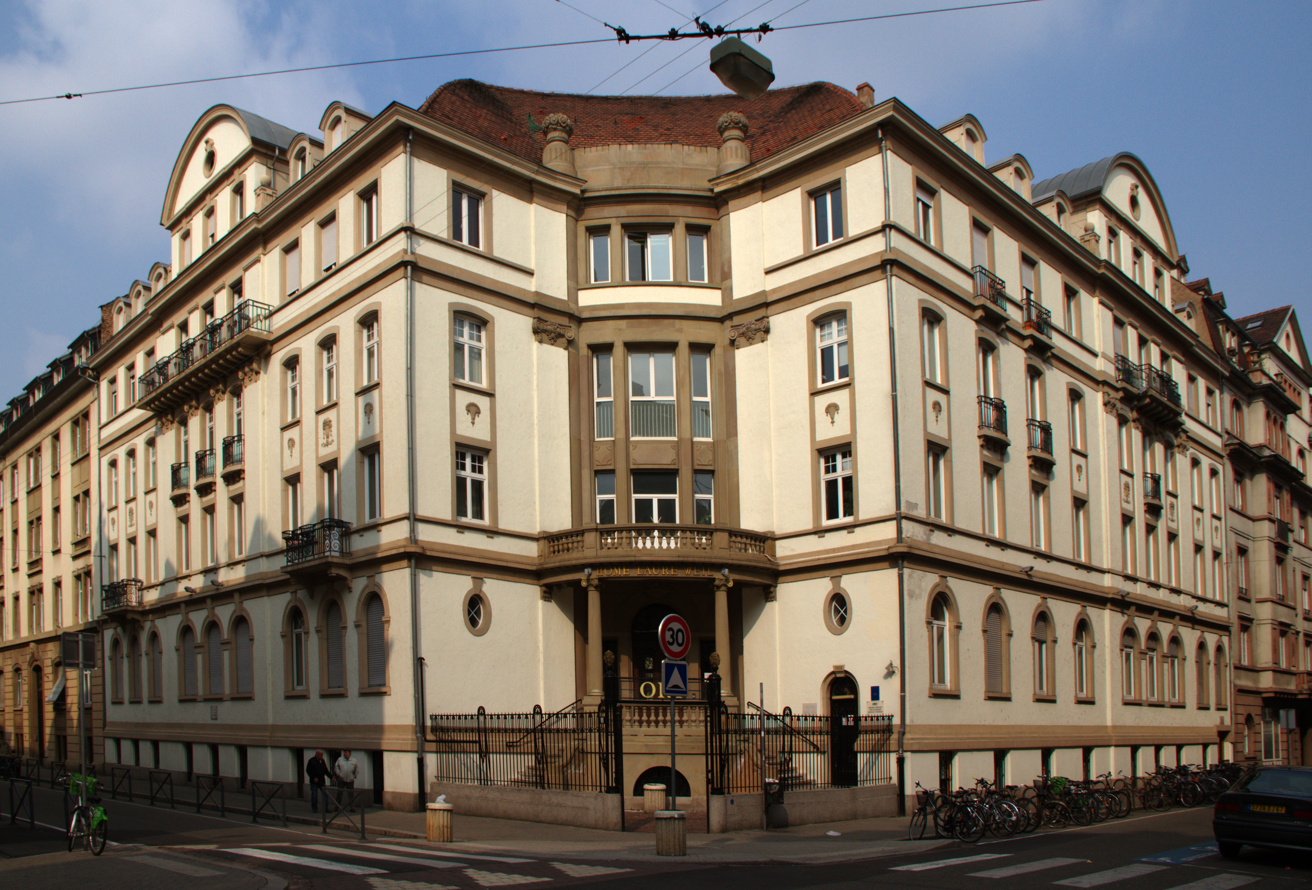 La cité Laure Weil et l’école ORT de Strasbourg. Ancien siège de la Gestapo pendant la seconde Guerre mondiale.